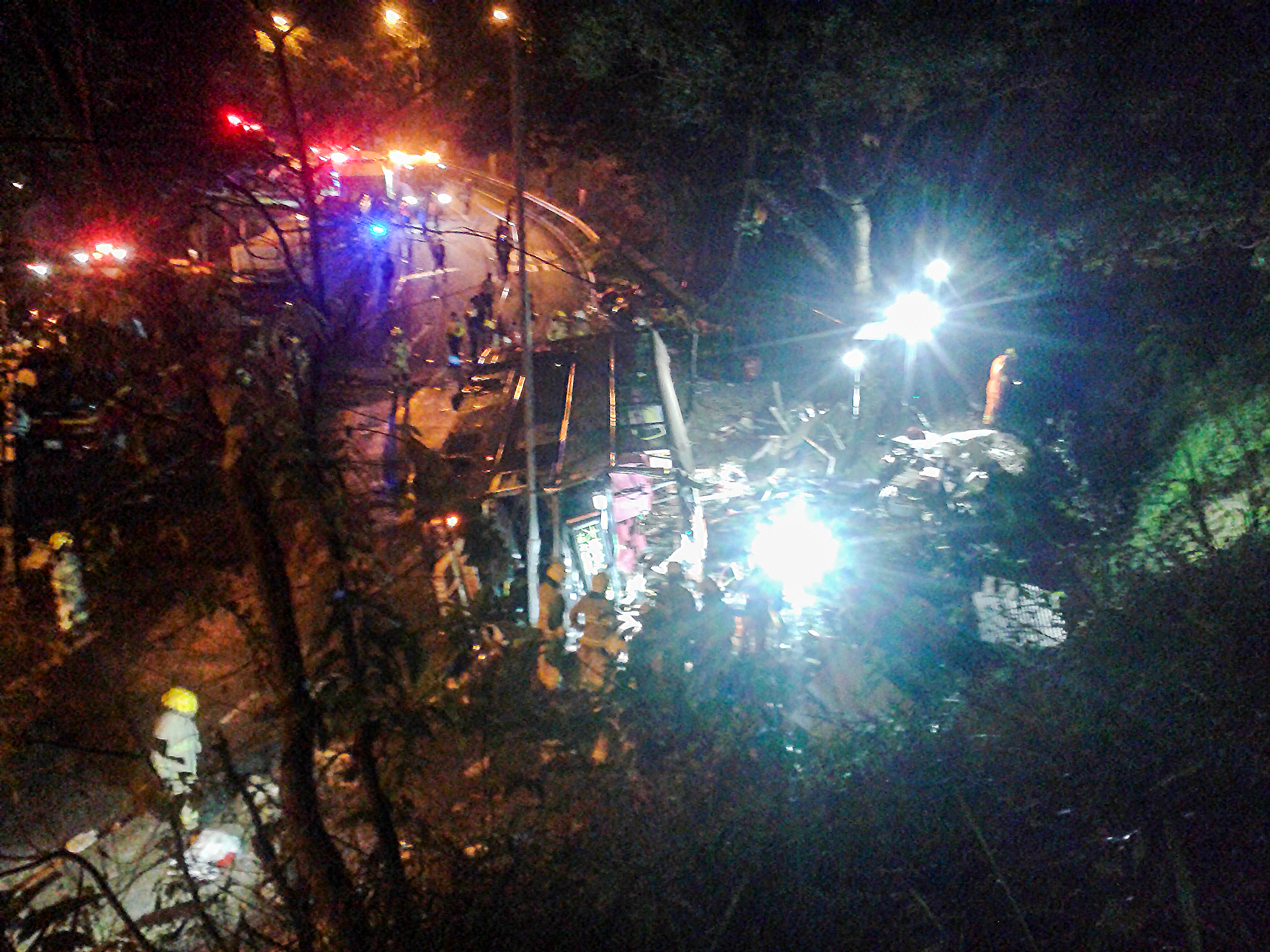 中文（香港）: 從遠距離拍攝2018年2月11日大埔公路雙層巴士翻側事故的意外現場